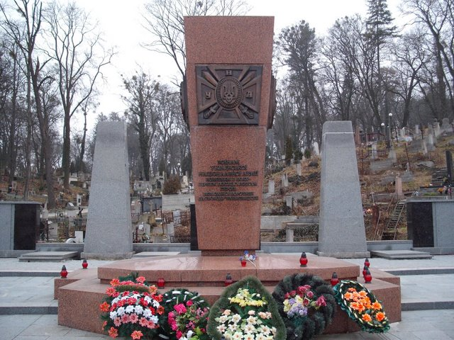 Pomnik poległych żołnierzy Ukraińskiej Armii Narodowej i 14 Dywizji Grenadierów na Cmentarzy Łyczakowskim we Lwowie